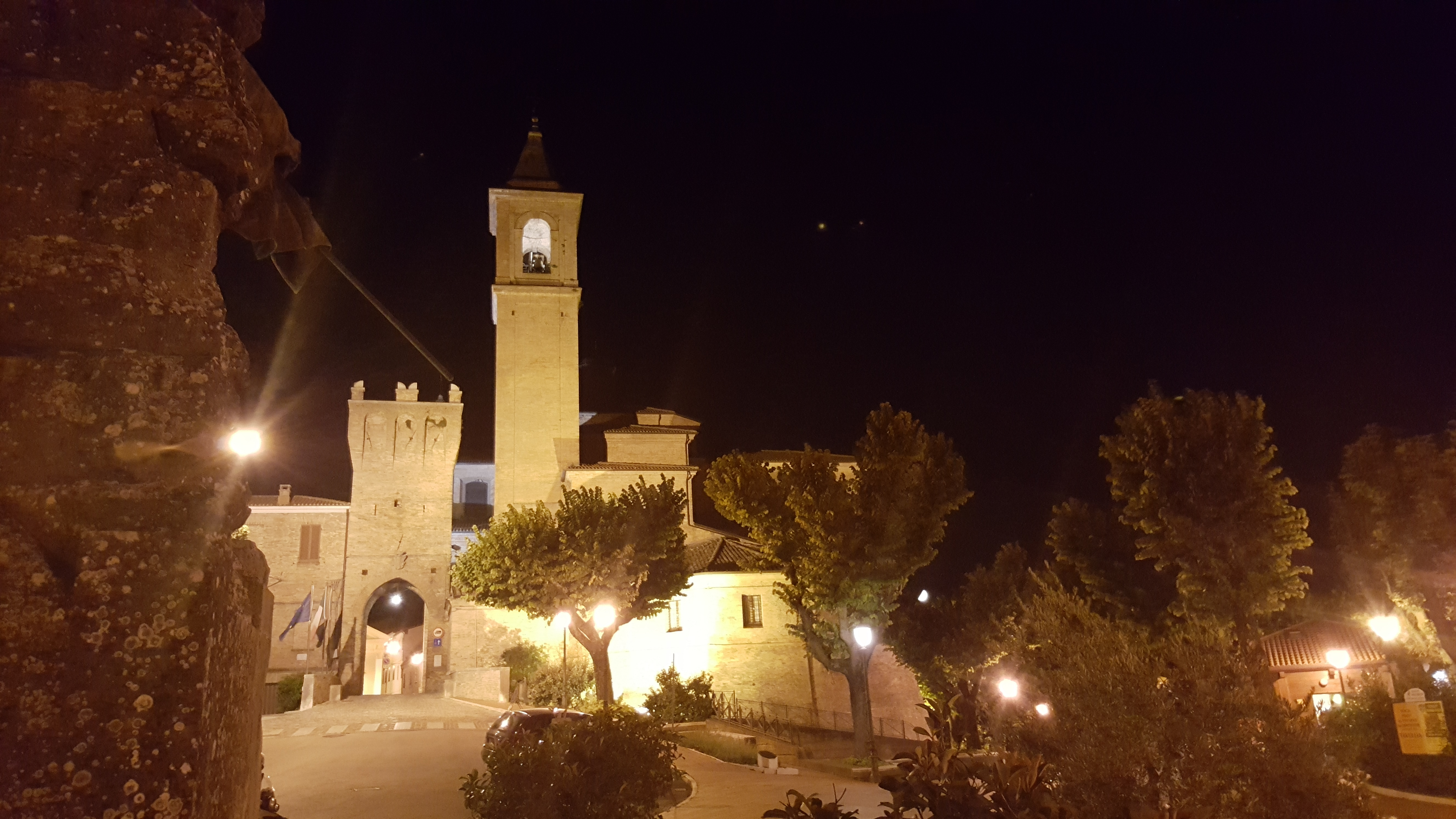 Museo di Saludecio e del Beato Amato This is a photo of a monument which is part of cultural heritage of Italy.